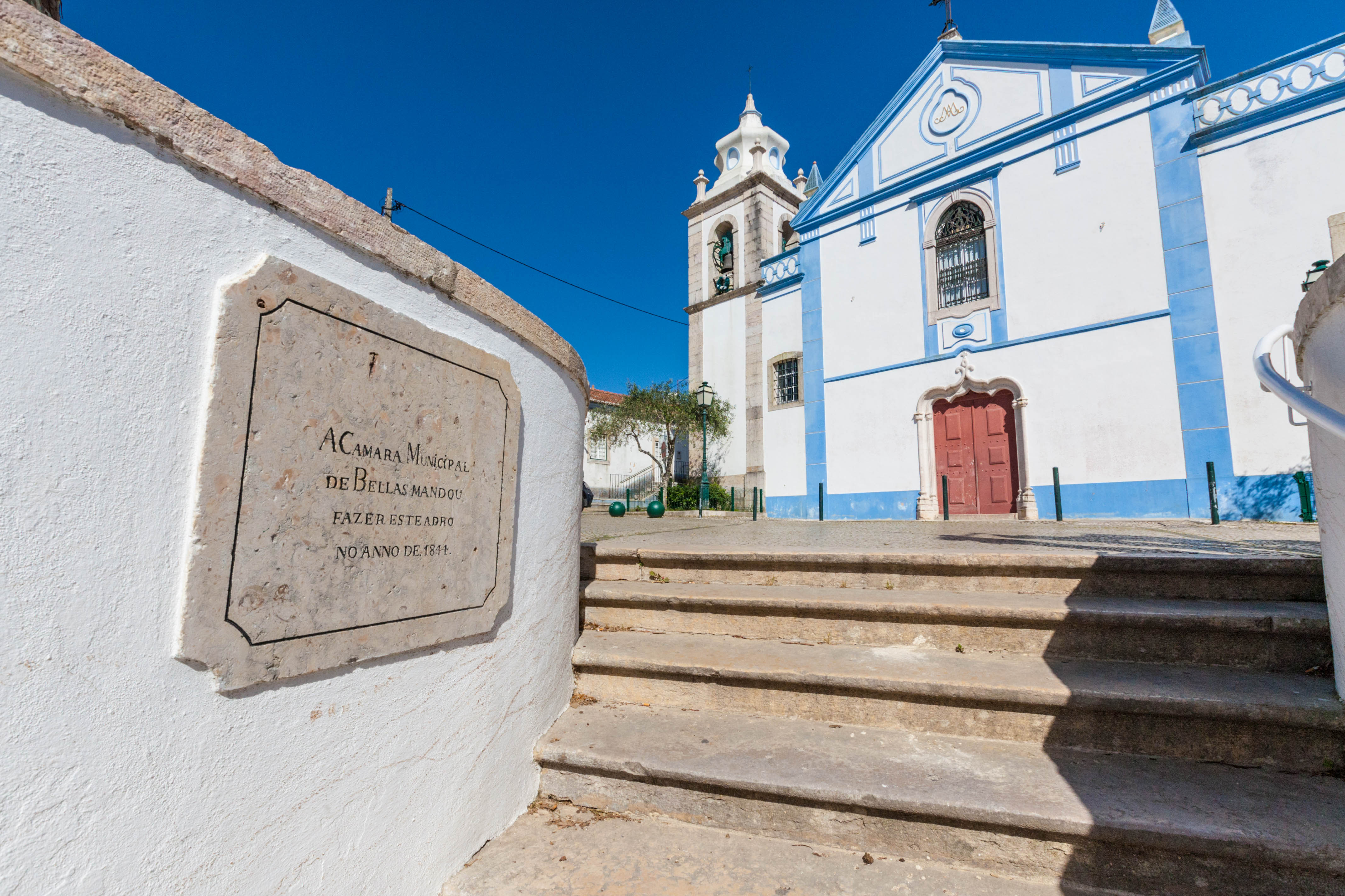 Igreja paroquial de Belas